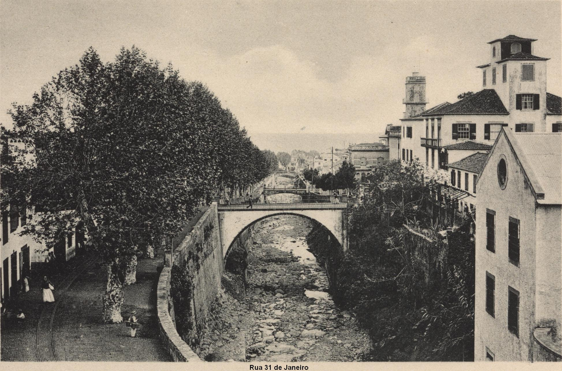 Ponte Nova da Rua dos Netos sobre a Ribeira de Santa Luzia. Rua 31 de Janeiro, Funchal. Macro-postal, c. 1900